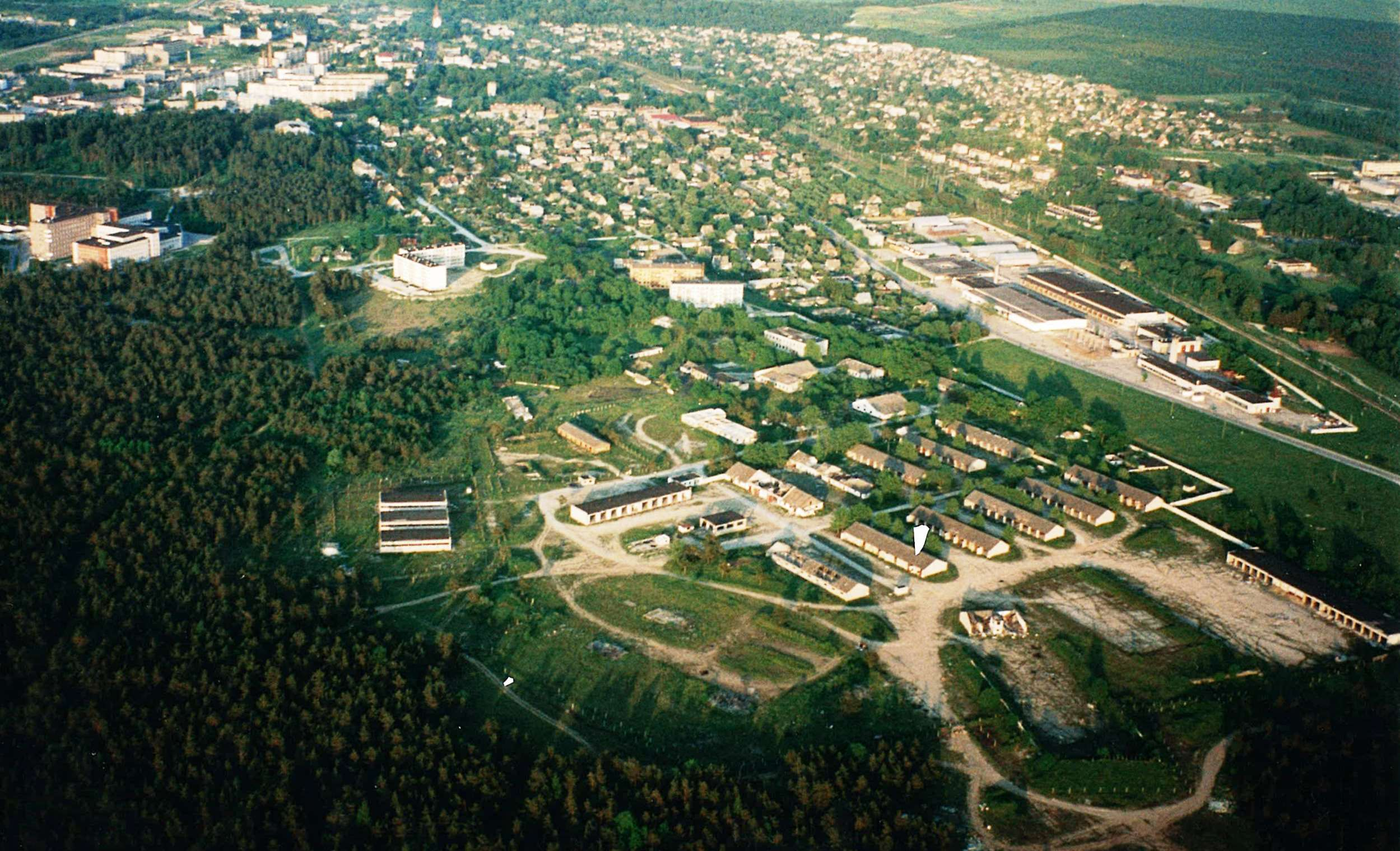 Vana foto Keilast. Nõukogude Liidu tankipolgust alles jäänud hooned. Pilt pärineb Aado Salumäe fotoaparaadiga varustatud mudellennukilt. Ühtlasi võib Salumäed pidada üheks Eesti esimeseks droonifotograafiks. Pildistamise aeg teadmata, arvatavasti 1990. aastate algul.